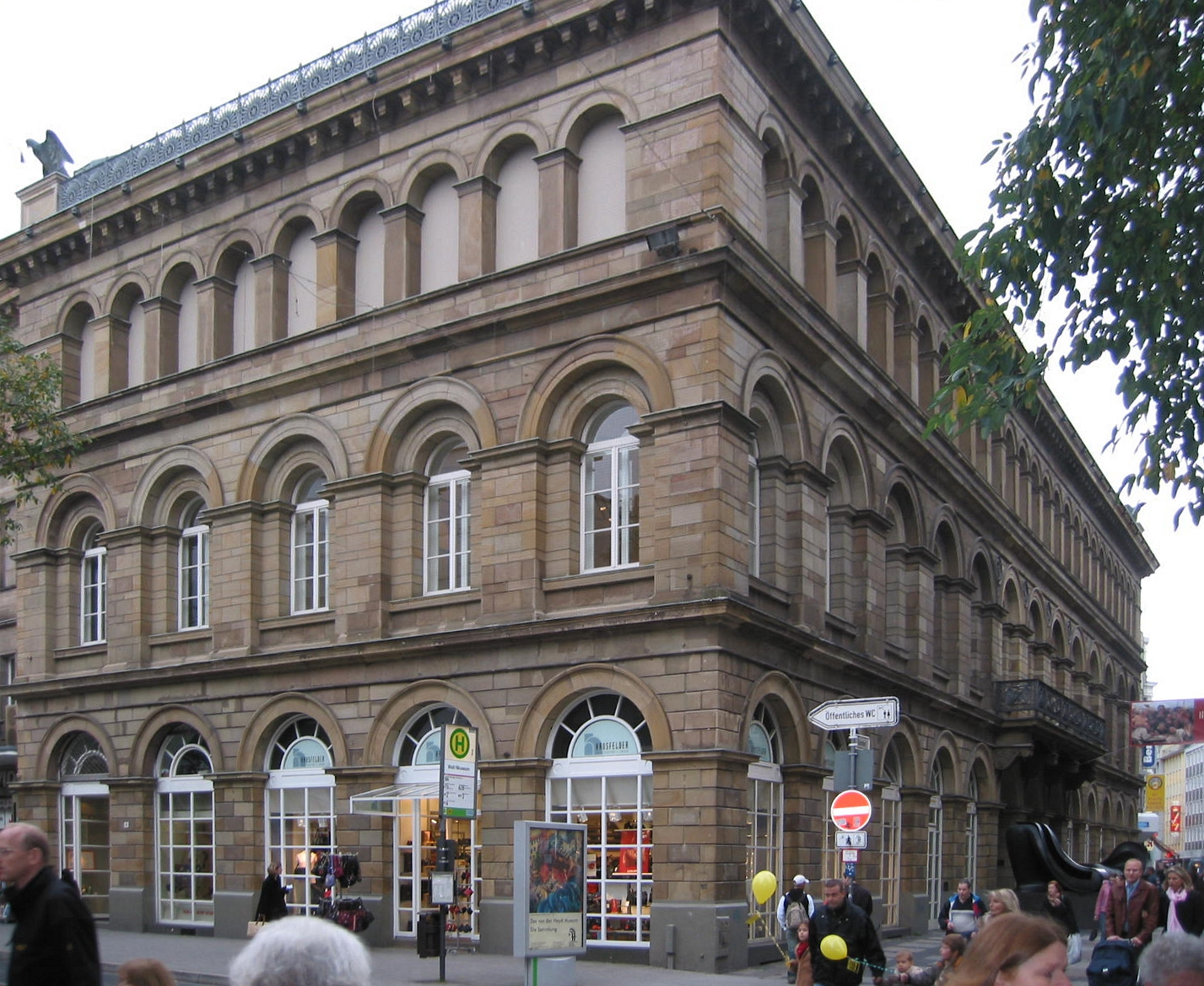 Wuppertal, Von-der-Heydt-Museum, ehem. Rathaus